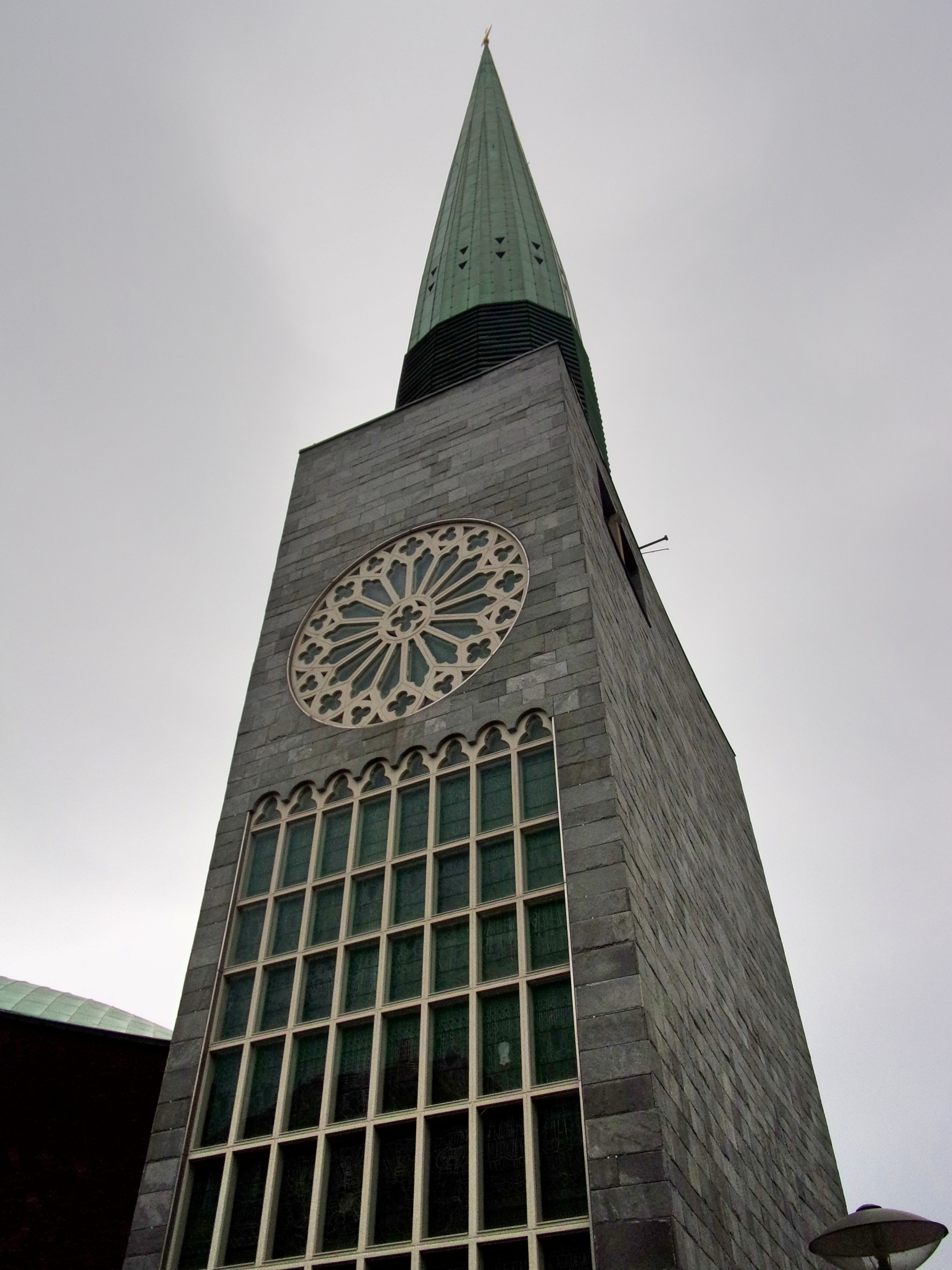 Turm der ev.-lutherischen St. Nikolai-Kirche am Harvestehuder Weg in Harvesrehude. This is a photograph of an architectural monument.